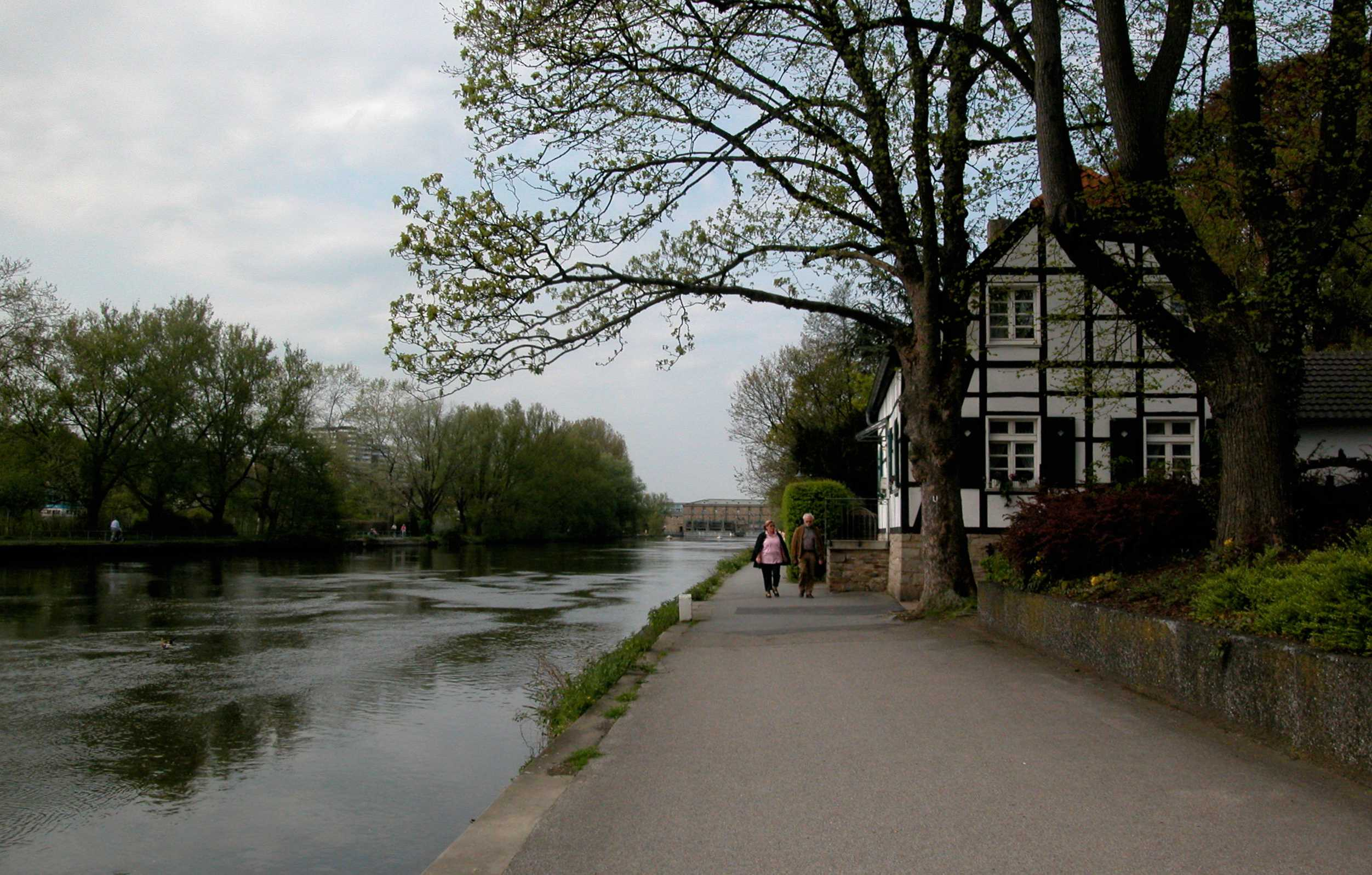 Leinpfad, ehemalige Treidelstation, Blick nach Norden